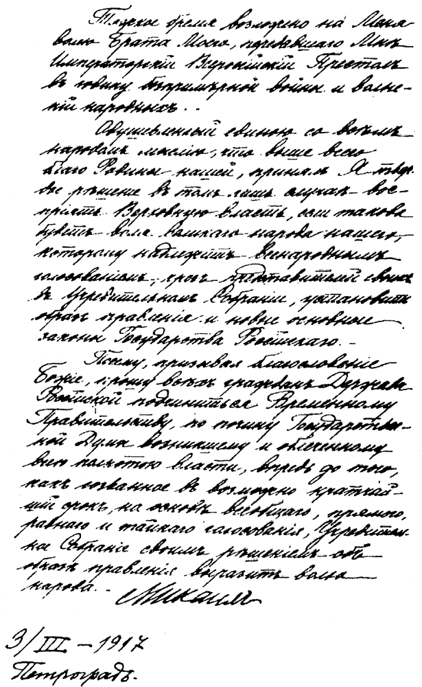 Отказ от принятия престола в.к. Михаила Александровича. 3 марта 1917 Автограф в.к. Михаила Александровича. 34,4х22,5